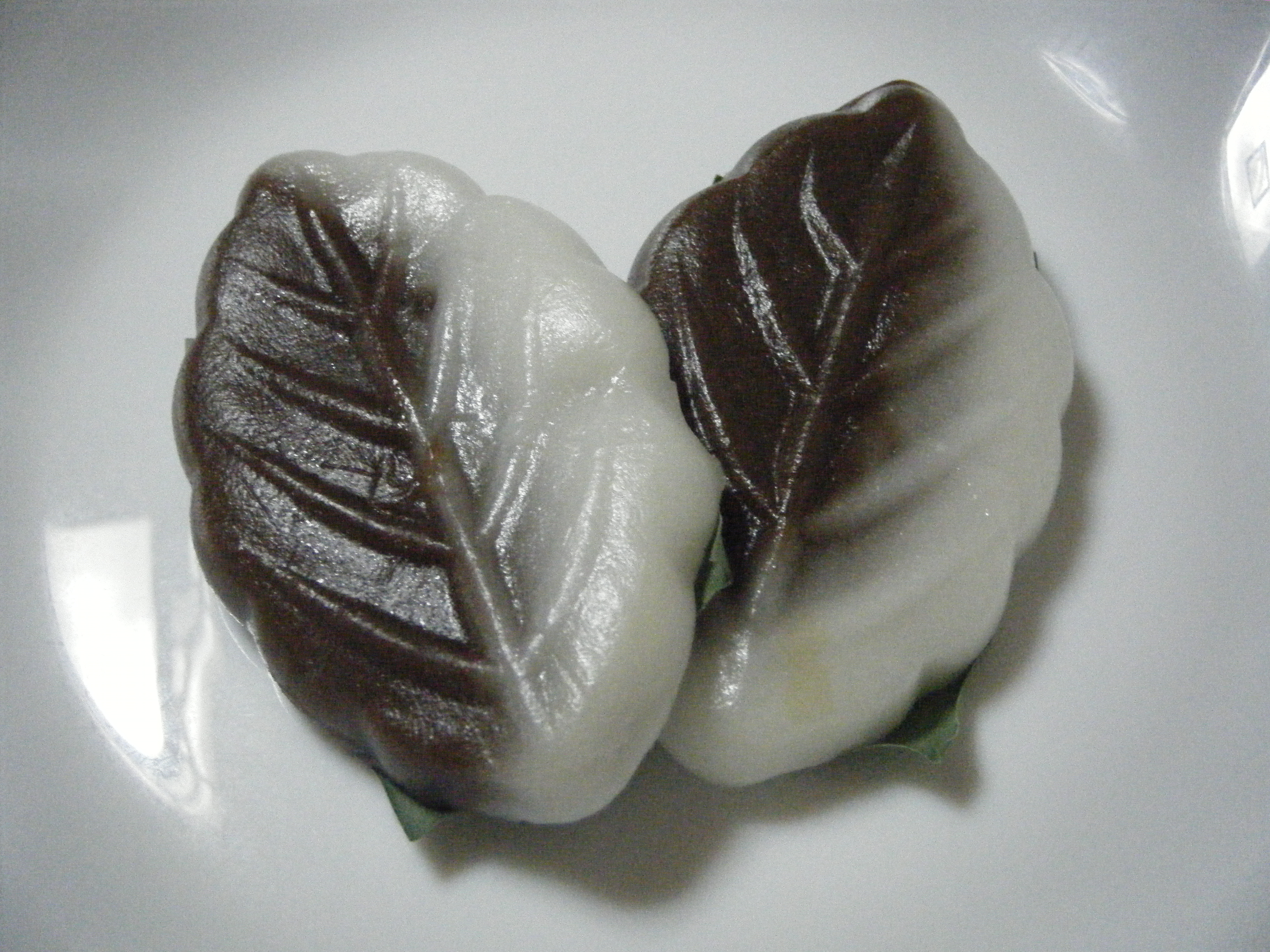 べこもち。北海道なので食べられる和菓子の一つ。